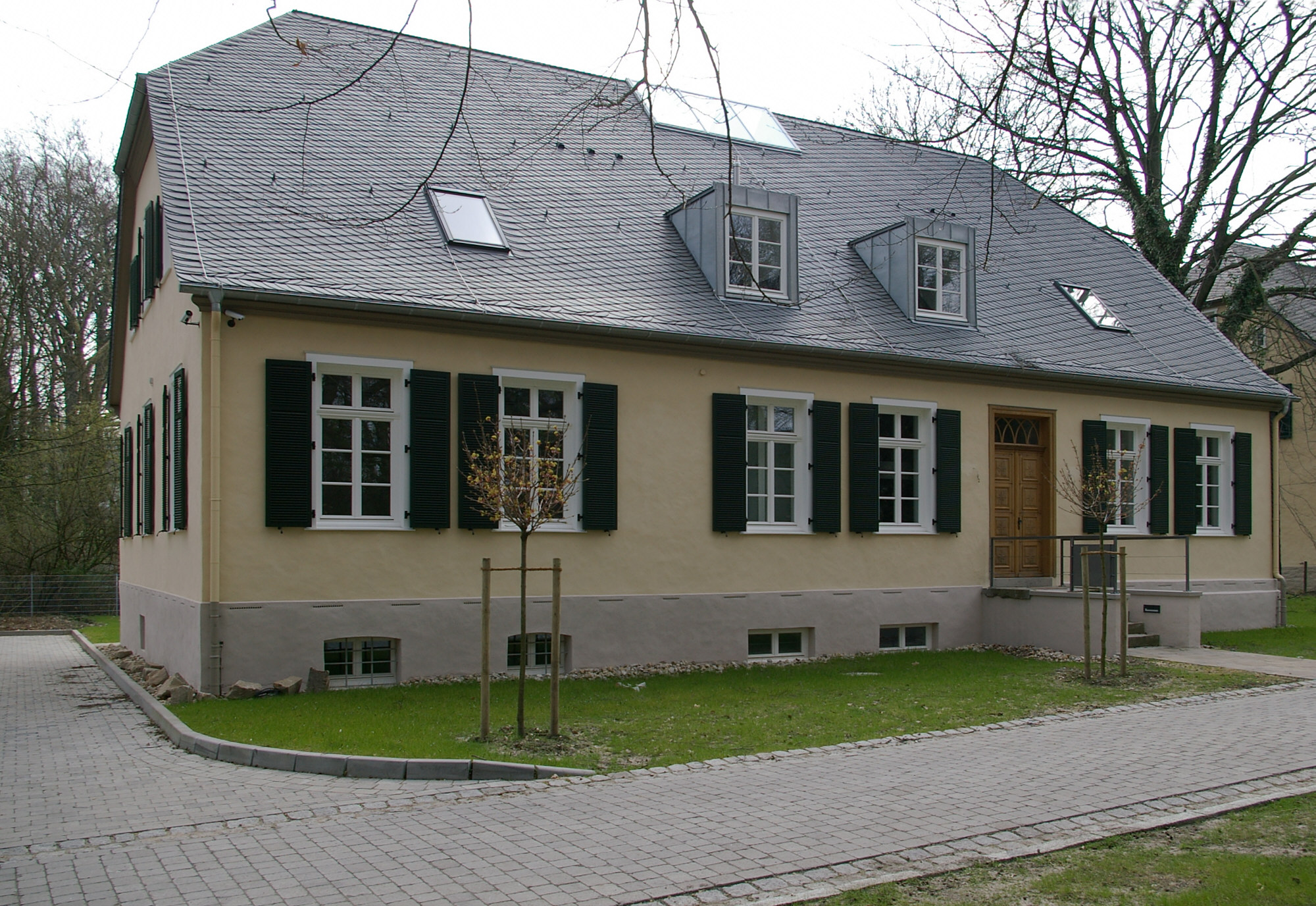 Das 2006/2007 aufwendig sanierte "Siedeinspectorhaus" der ehemaligen Saline Königsborn, Unna